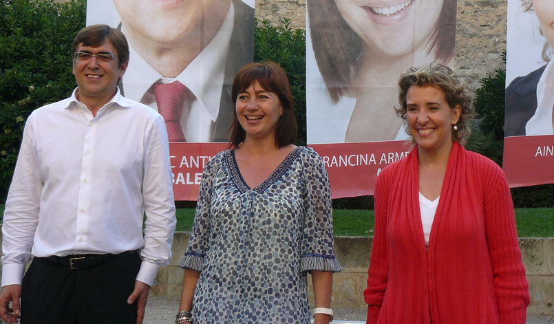 aferrada (18)